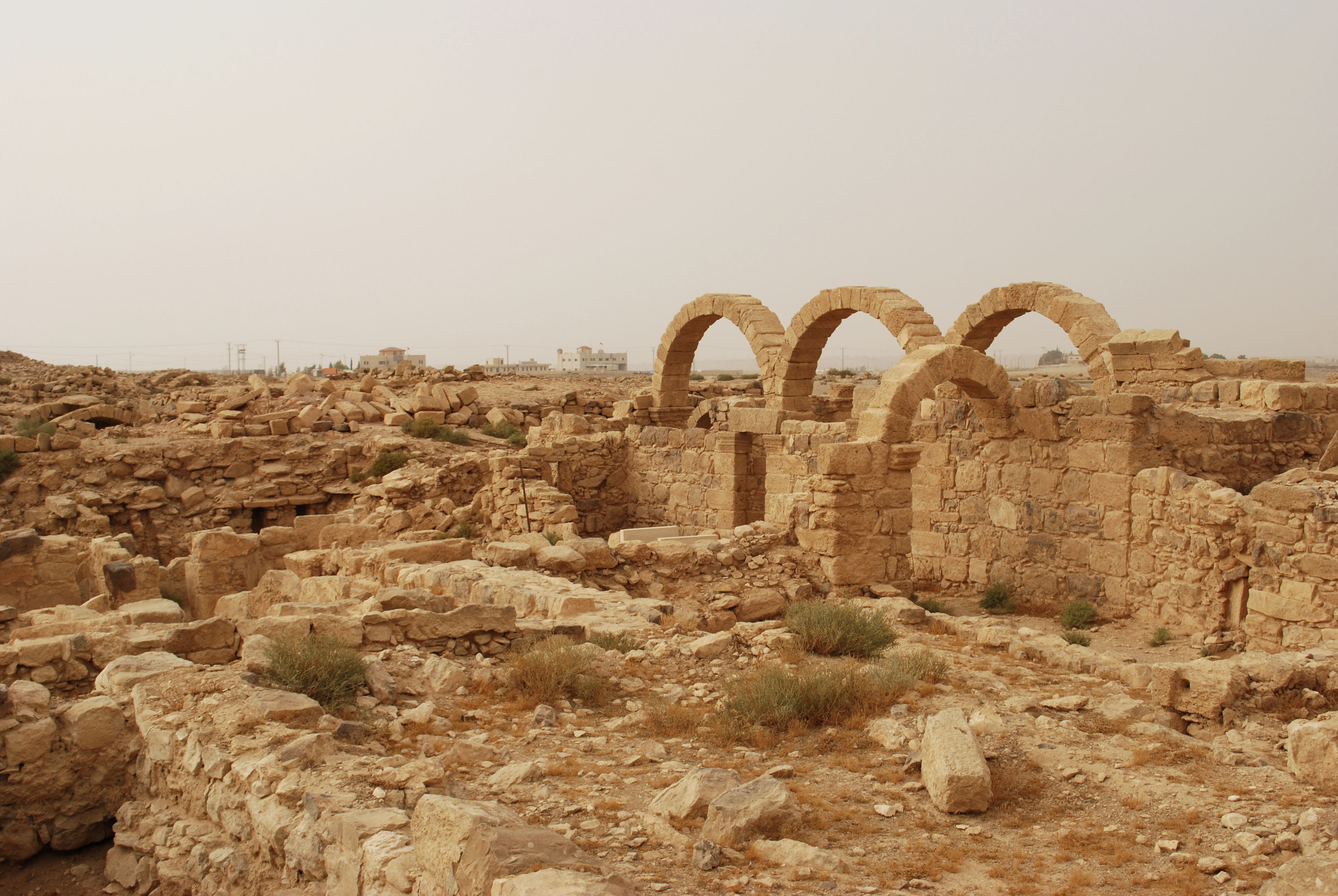 Les vestiges de la ville d'Umm ar-Rasas.